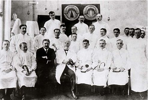 Gustav Killian an die Hals- und Nasen-Klinik der Charité in der Schumannstrasse